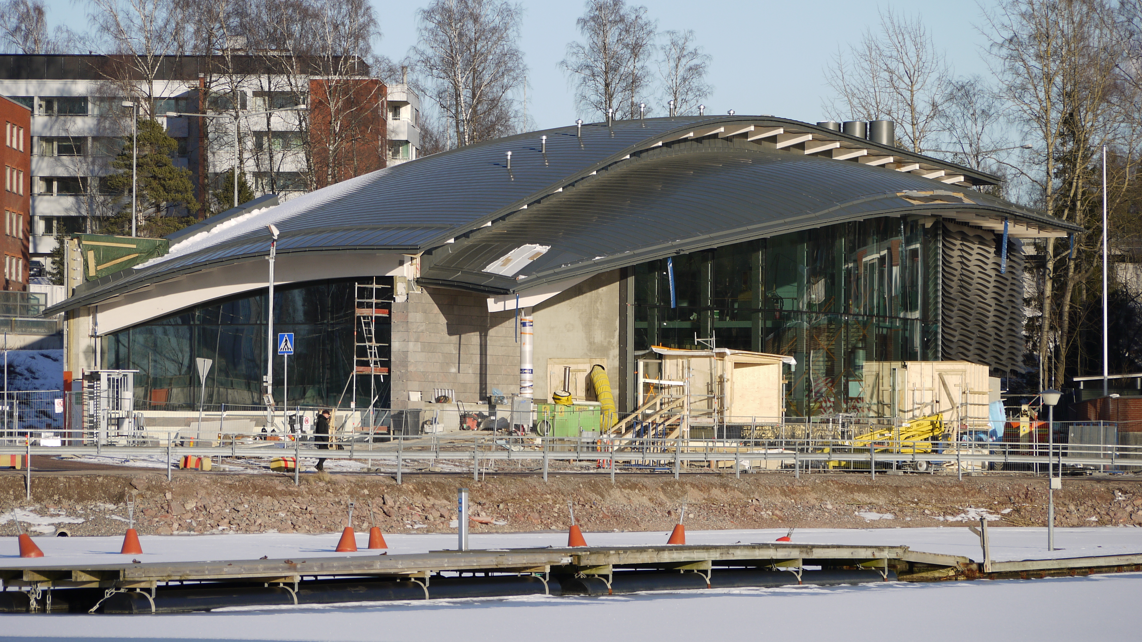 Koivusaaren metroaseman itäinen sisäänkäynti.